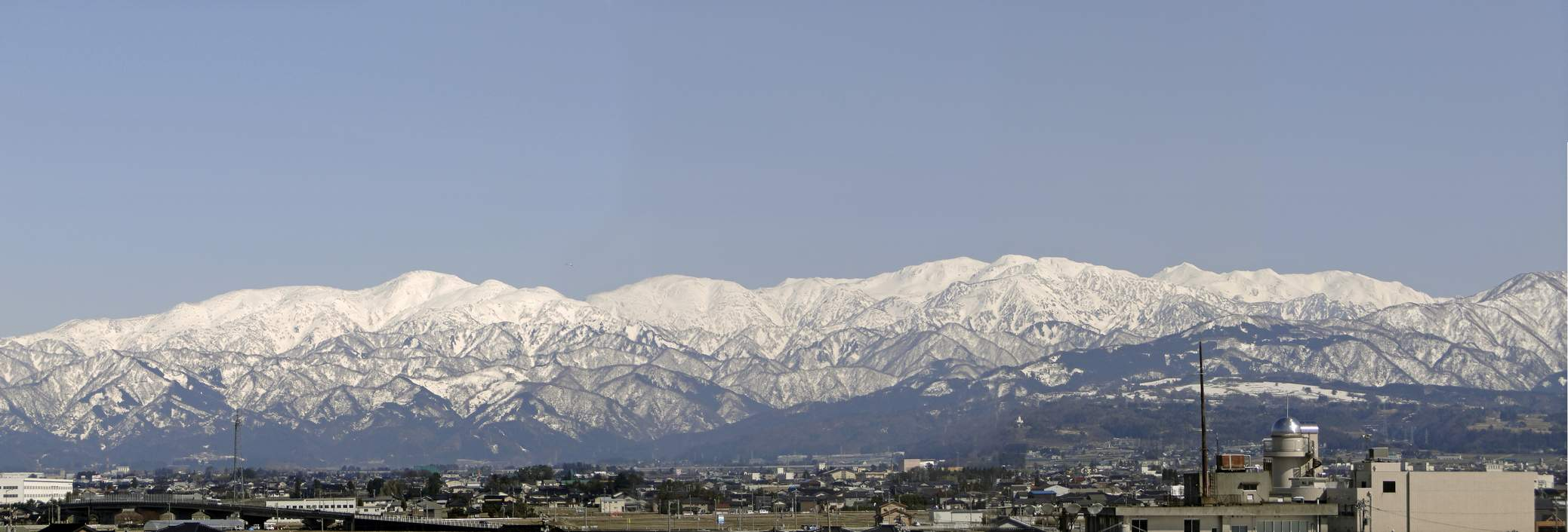 後立山連峰 2012年4月8日